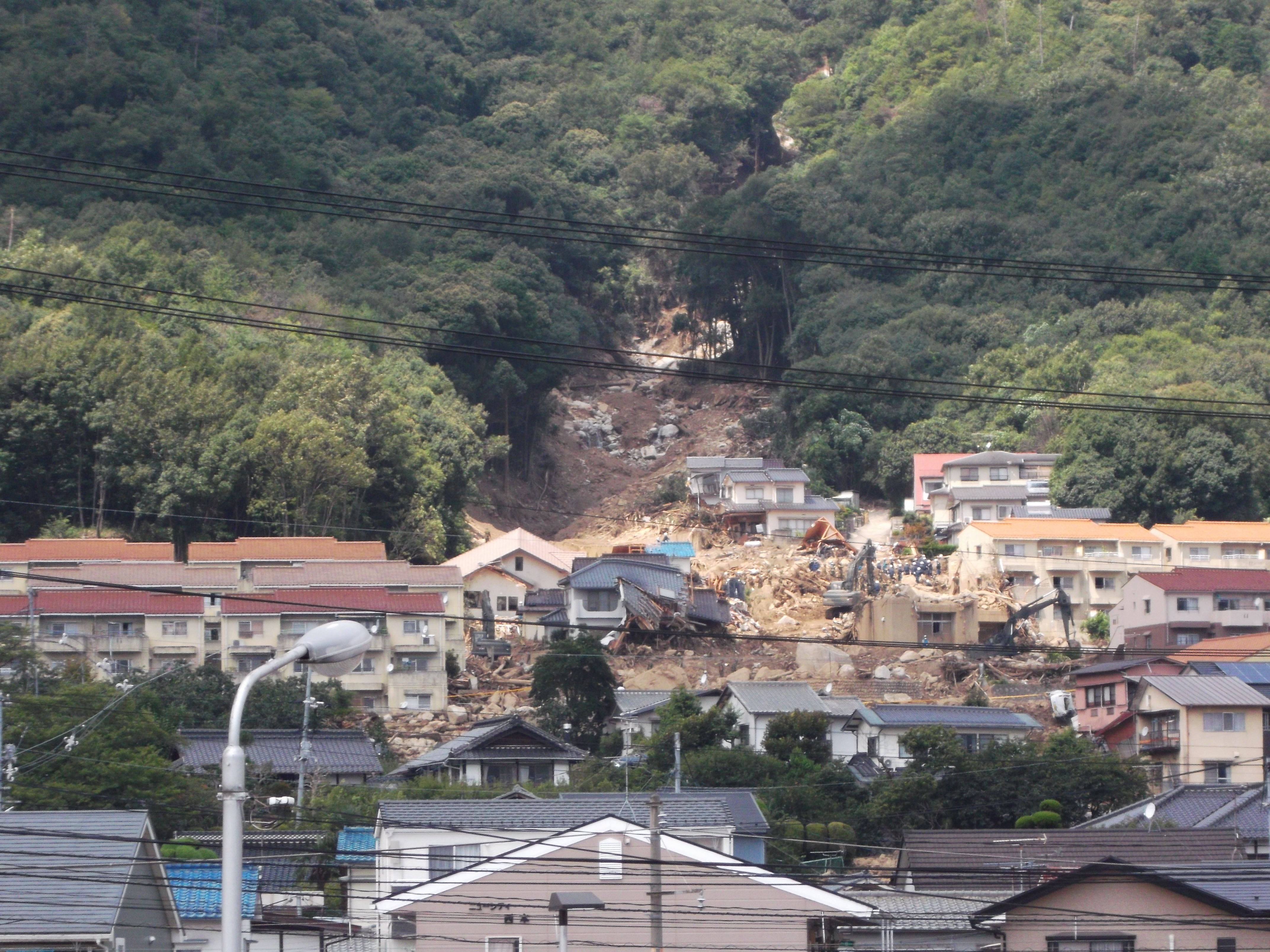 2014年8月の広島の豪雨被害（八木地区）北緯34度28分36.07秒 東経132度29分21.34秒